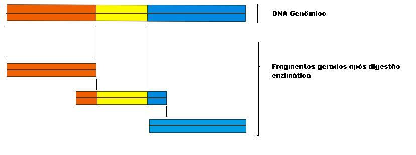 Sobreposição de clones derivados de um DNA fragmentado